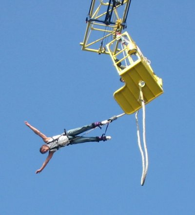 Begin van een bungee jump, eigen foto